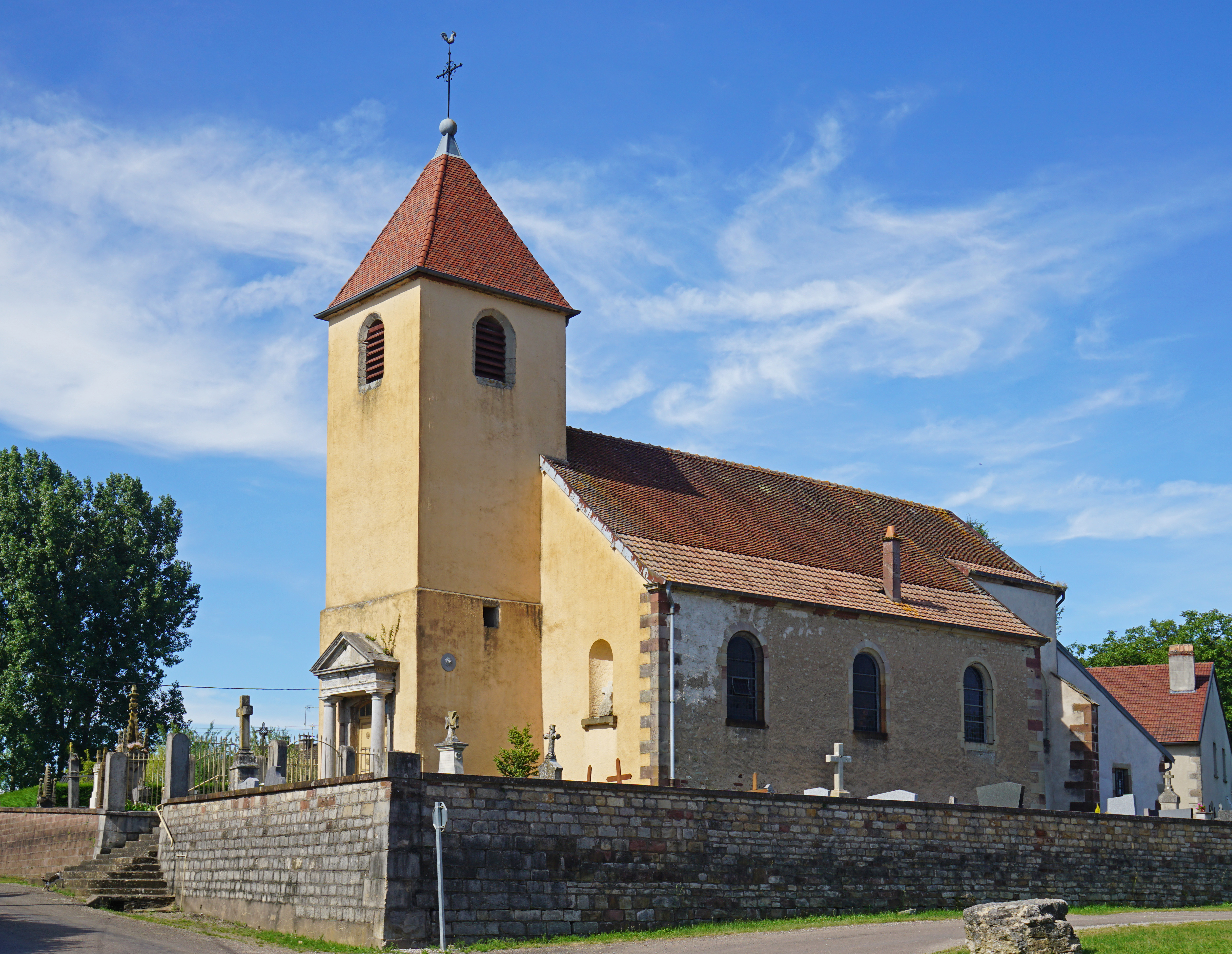 L'église de Saint-Ferjeux.